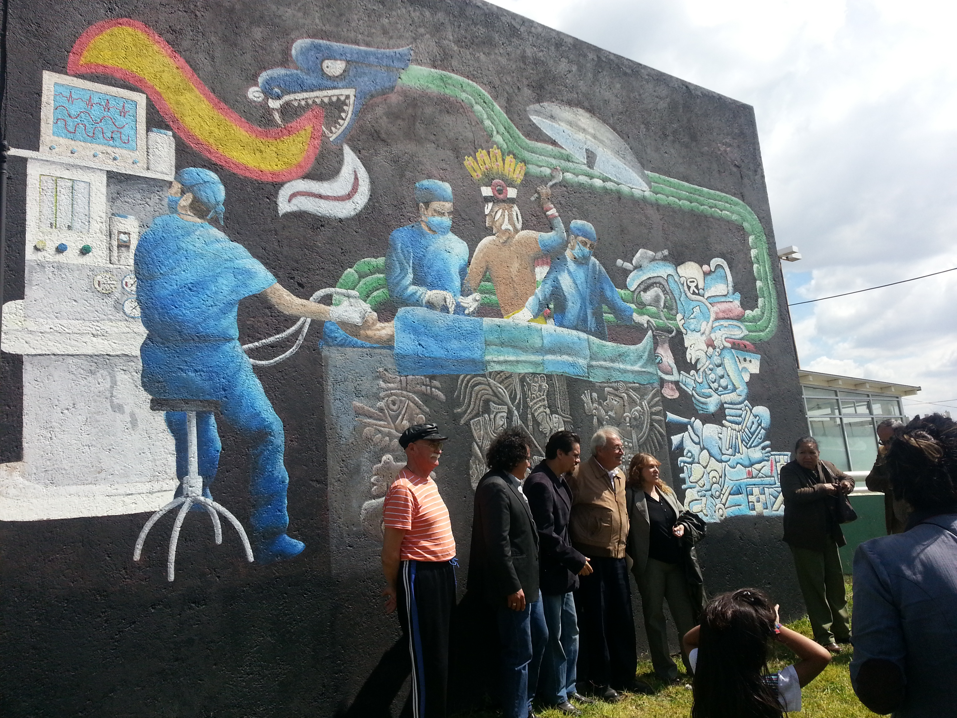 Foto Tomada en la develacion del Mural del Hospital General las Americas en Chamarra de color Beige el Pintor Vigos.